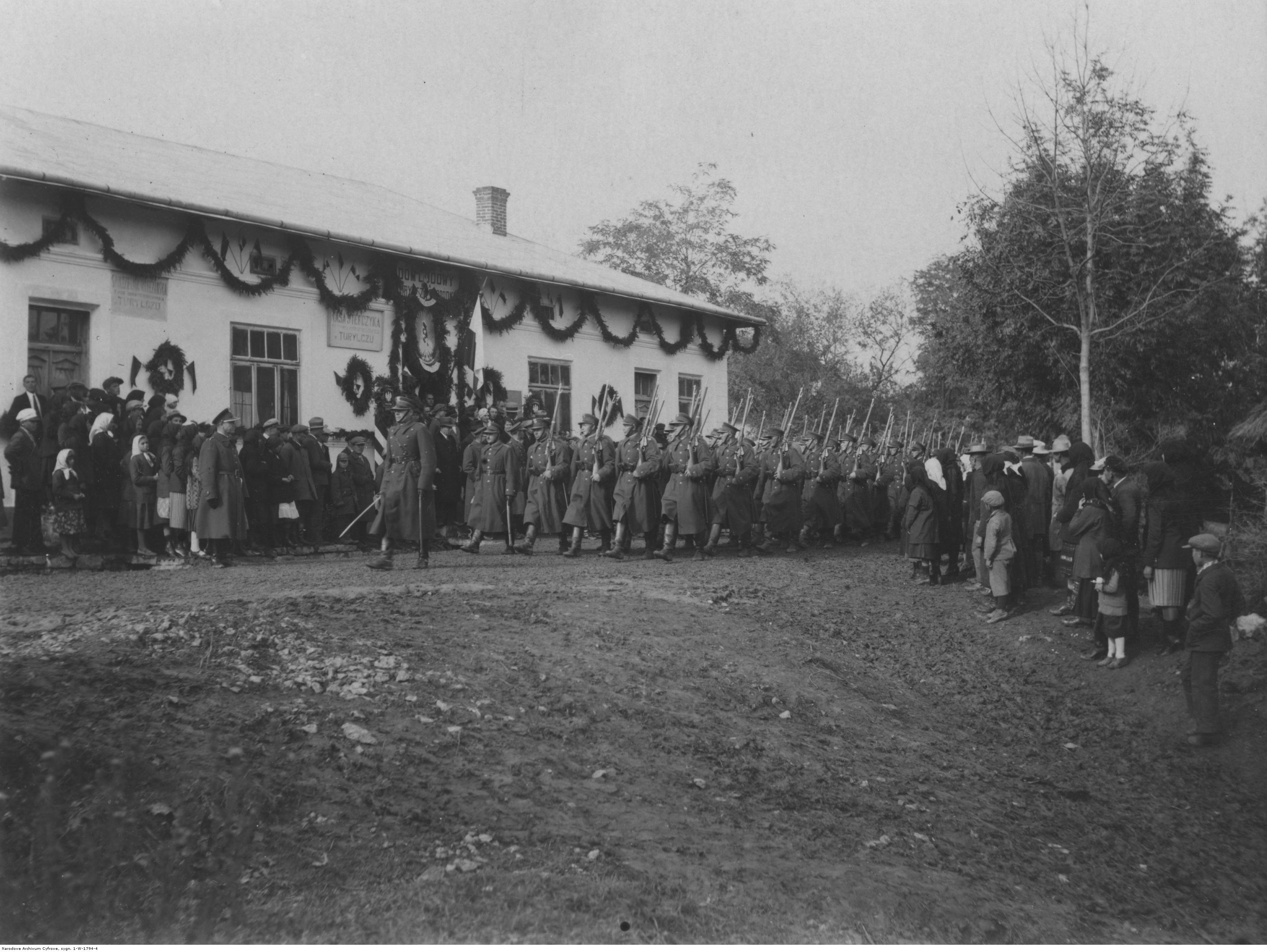 Uroczystości X-lecia istnienia Korpusu Ochrony Pogranicza w kompanii KOP stacjonującej w Turylczu. Defilada oddziałów KOP uzbrojonych w karabiny Berthier wz. 1916 przed Domem Ludowym w Turylczu. Widoczna reklama Kasy Stefczyka oraz Spółdzielni Mleczarskiej w Turylczu. Koncern Ilustrowany Kurier Codzienny - Archiwum Ilustracji. Sygnatura: 1-W-1794-4